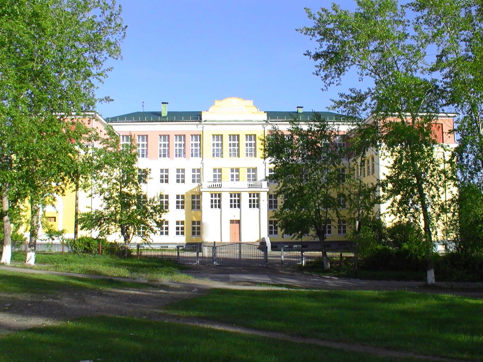 моу сош 6 карпинск